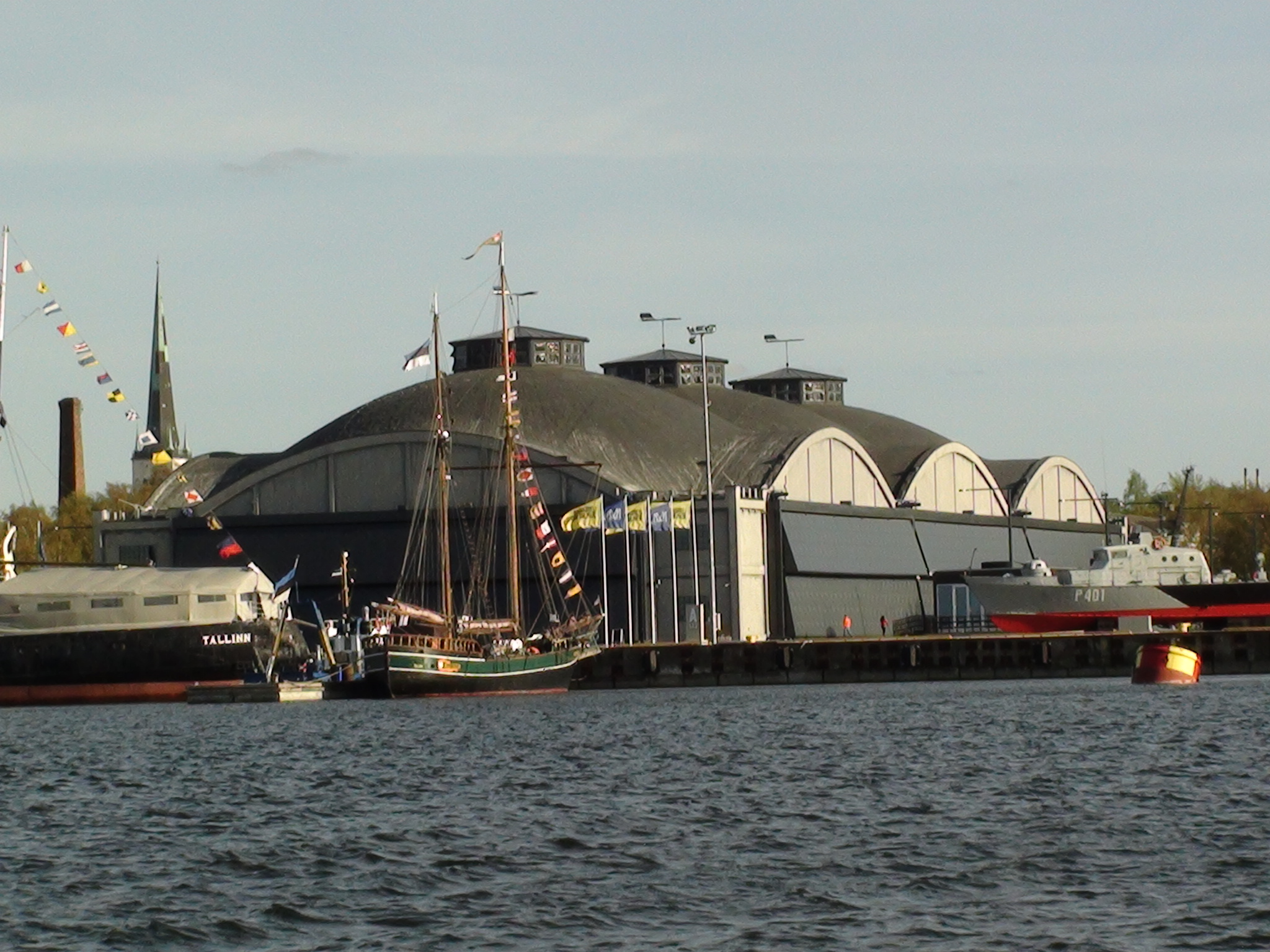 Vesilennukite angaarid, vaade Tallinna lahelt